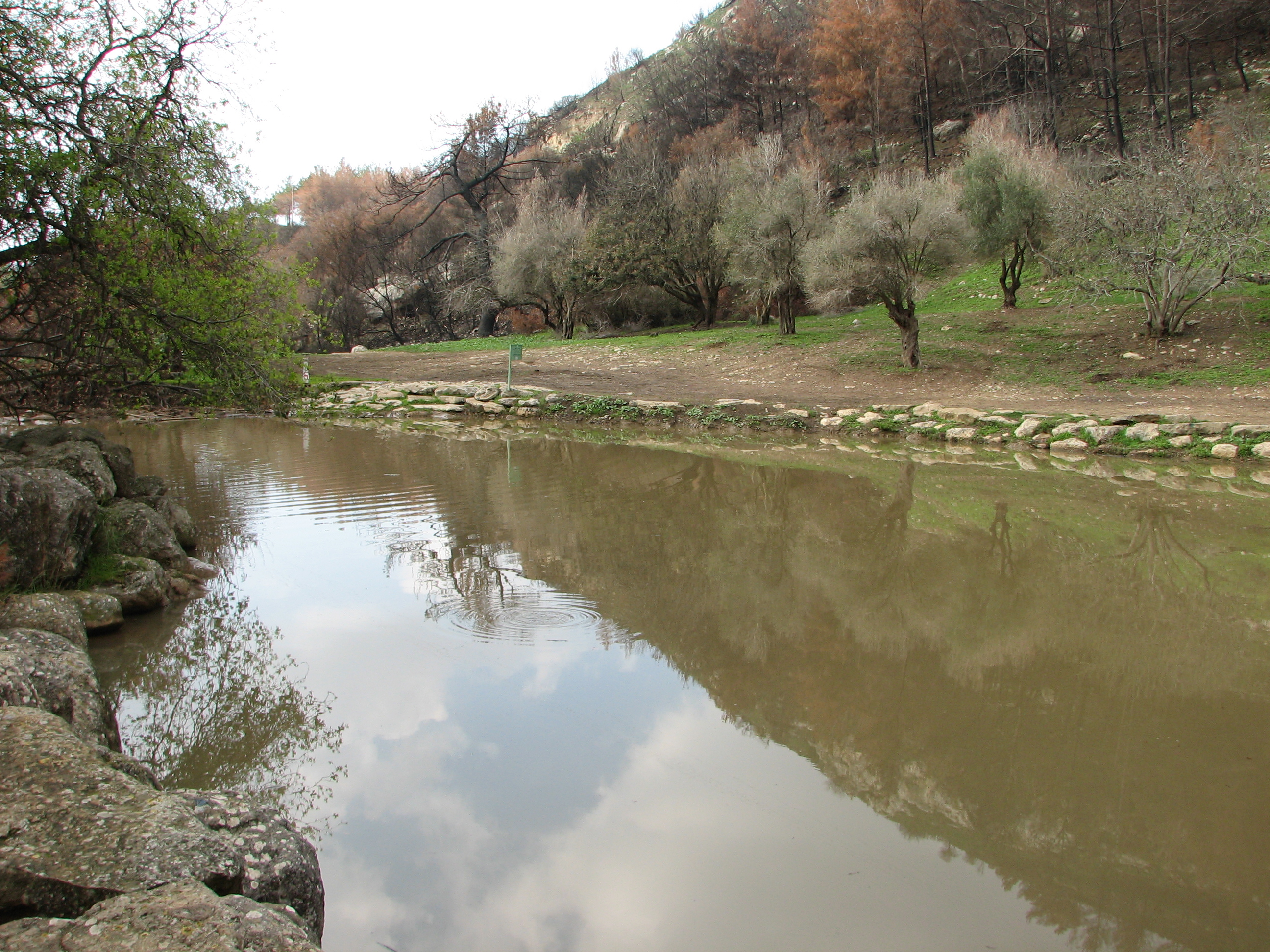 Oren Wadi - Mount Carmel Israel